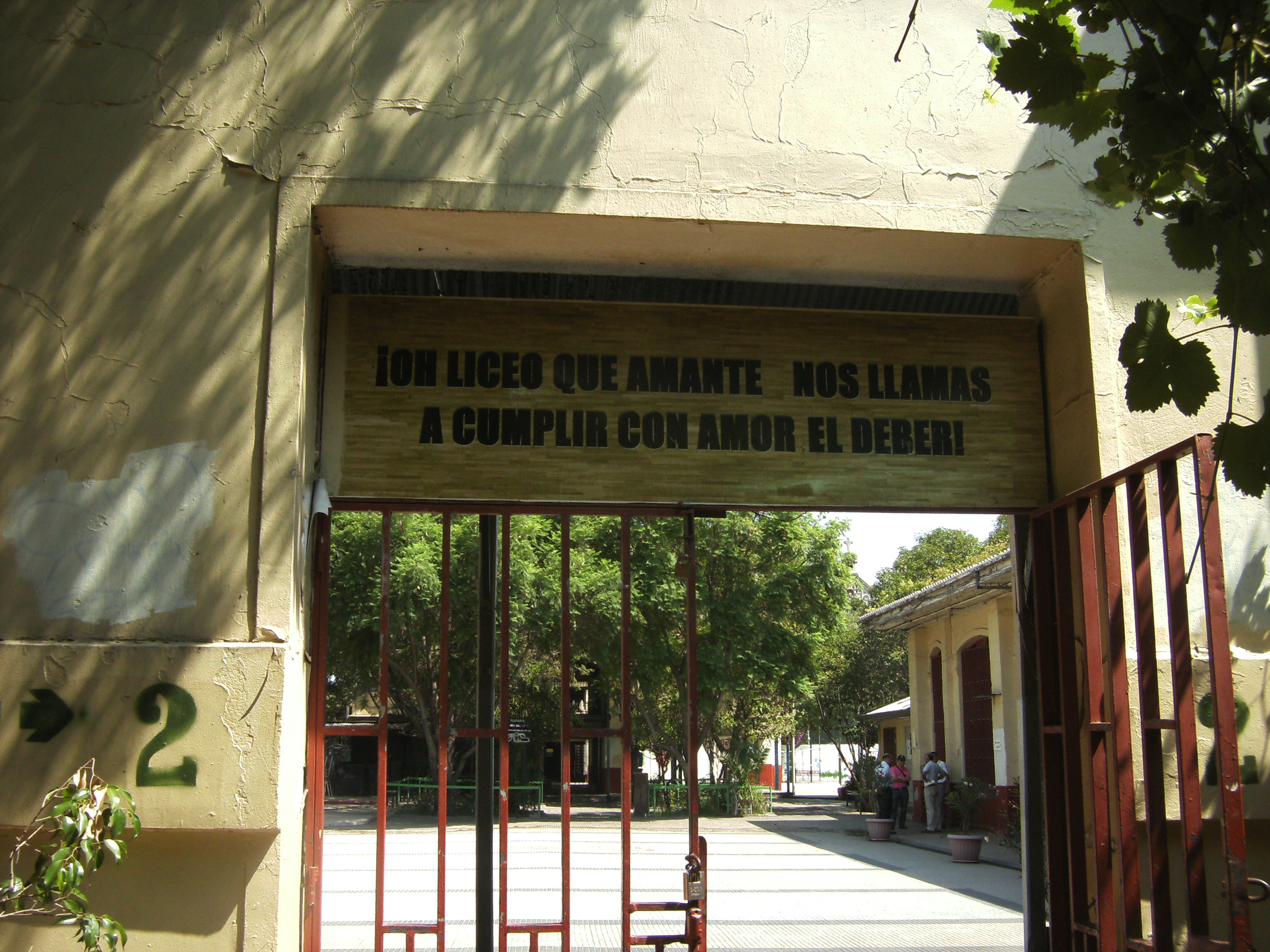 Visiones del liceo Amunátegui del Barrio Yungay en Santiago de Chile